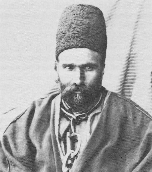 Varqá